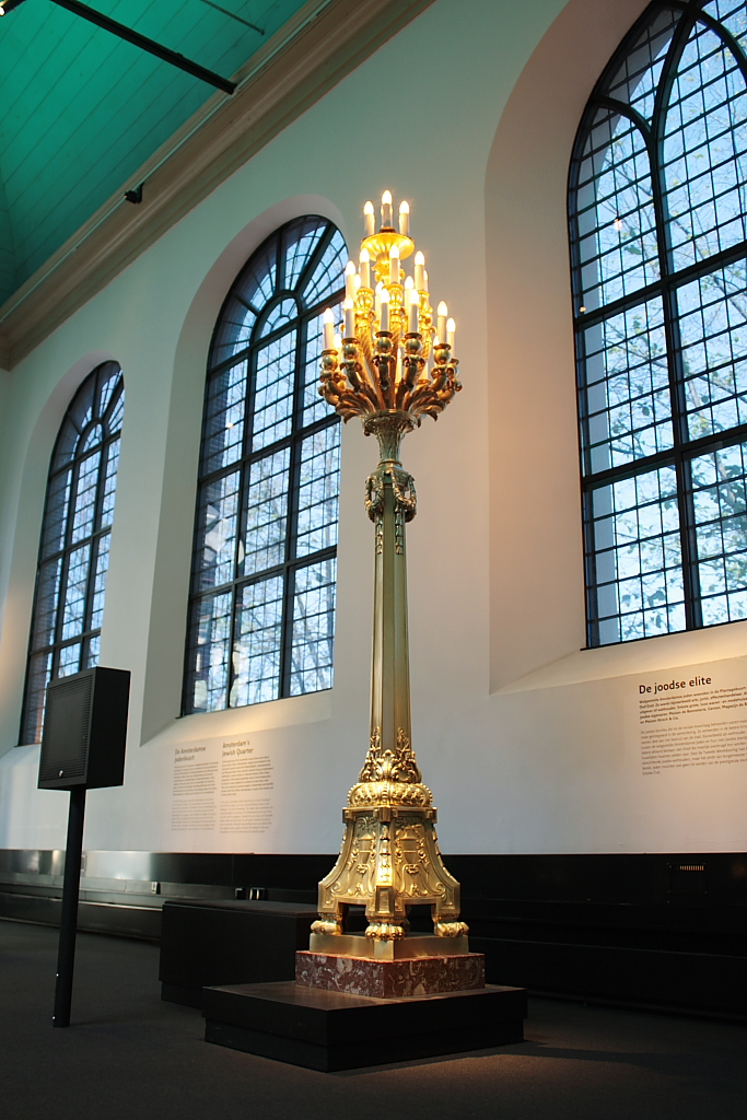 Lamp Hirsch & Cie, b2198 A lamp that used to adorn the Hirsch & Cie. department store on Leidse Square in Amsterdam. Copper alloy + marble + stone. Date 1910=1912. Slightly colour corrected.